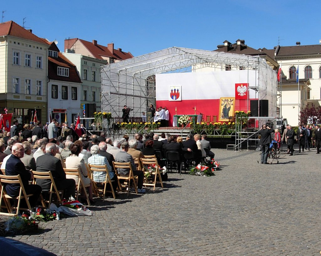 Stary Rynek w Bydgoszczy, uroczystości 3 Maja